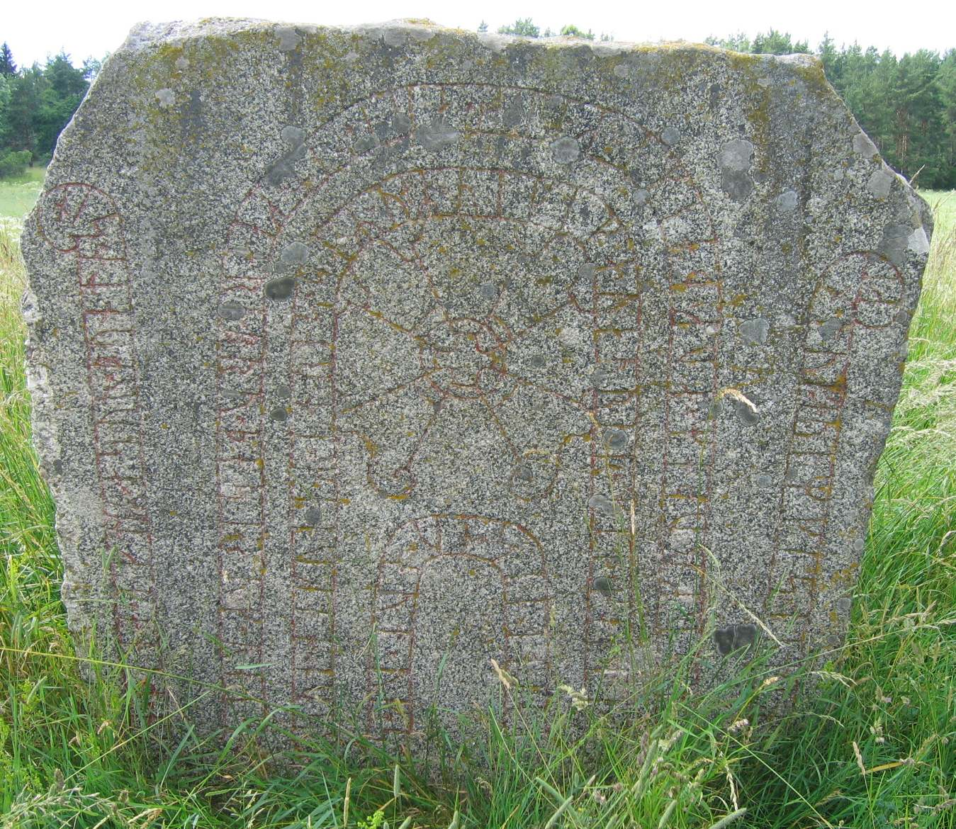 Runestone